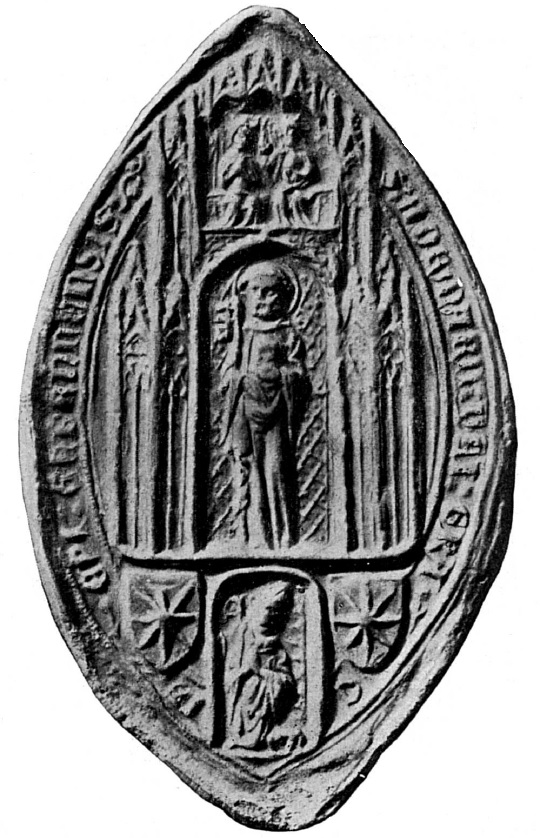 Sceau d'Adhémar Fabri, évêque de Genève 1385-1388. Au centre, St. Pierre, patron de la Cathédrale de Genève. En bas, le prélat agenouillé, entre deux écus à ses armes.